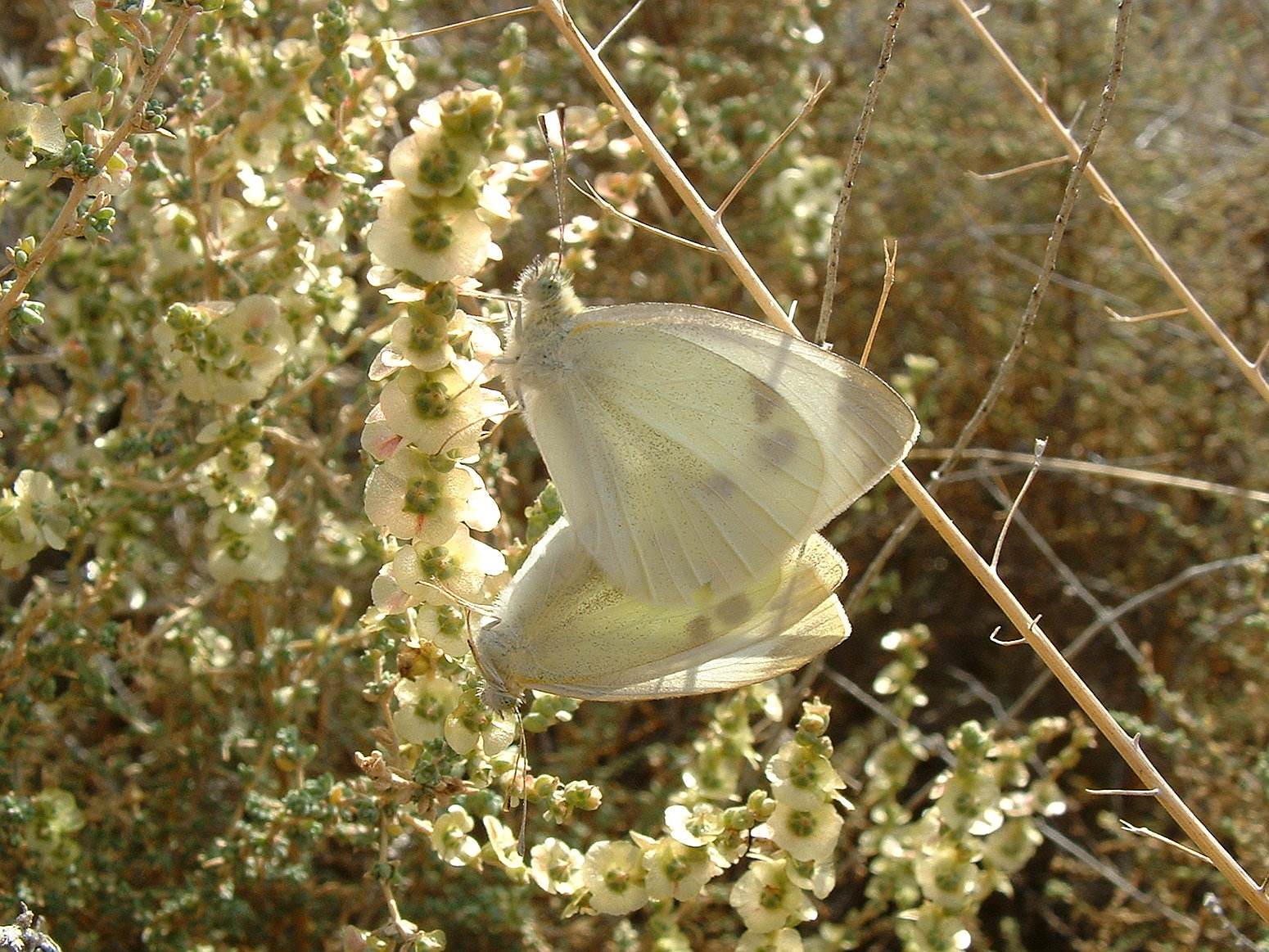 Artogeia mannii (Pieridae). Rivas Vaciamadrid, Madrid, España.